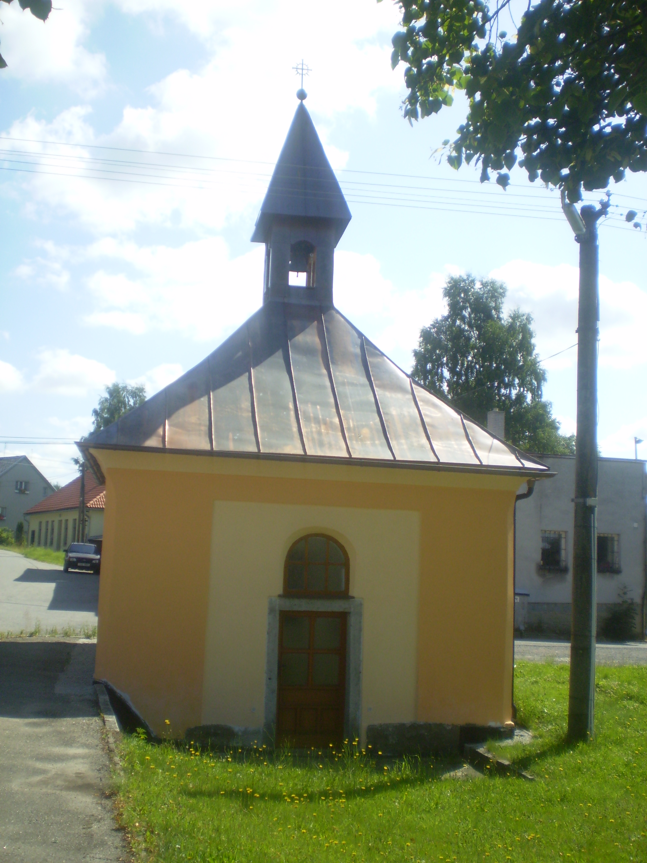 kaplička v Ústí na návsi